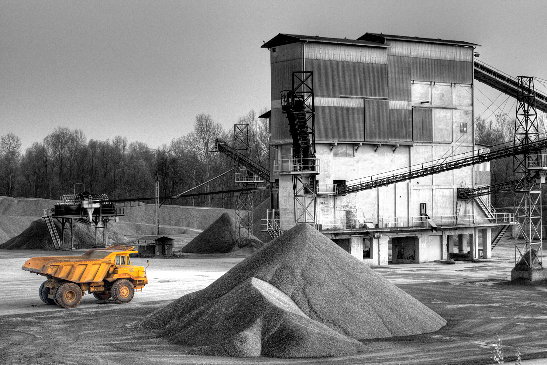 Frantoio Albone - Campogalliano (MO)